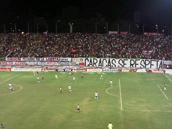 Caracas Fútbol Club vs. Universidad Católica. Estadio Olímpico de la Universidad Central de Venezuela, Caracas.